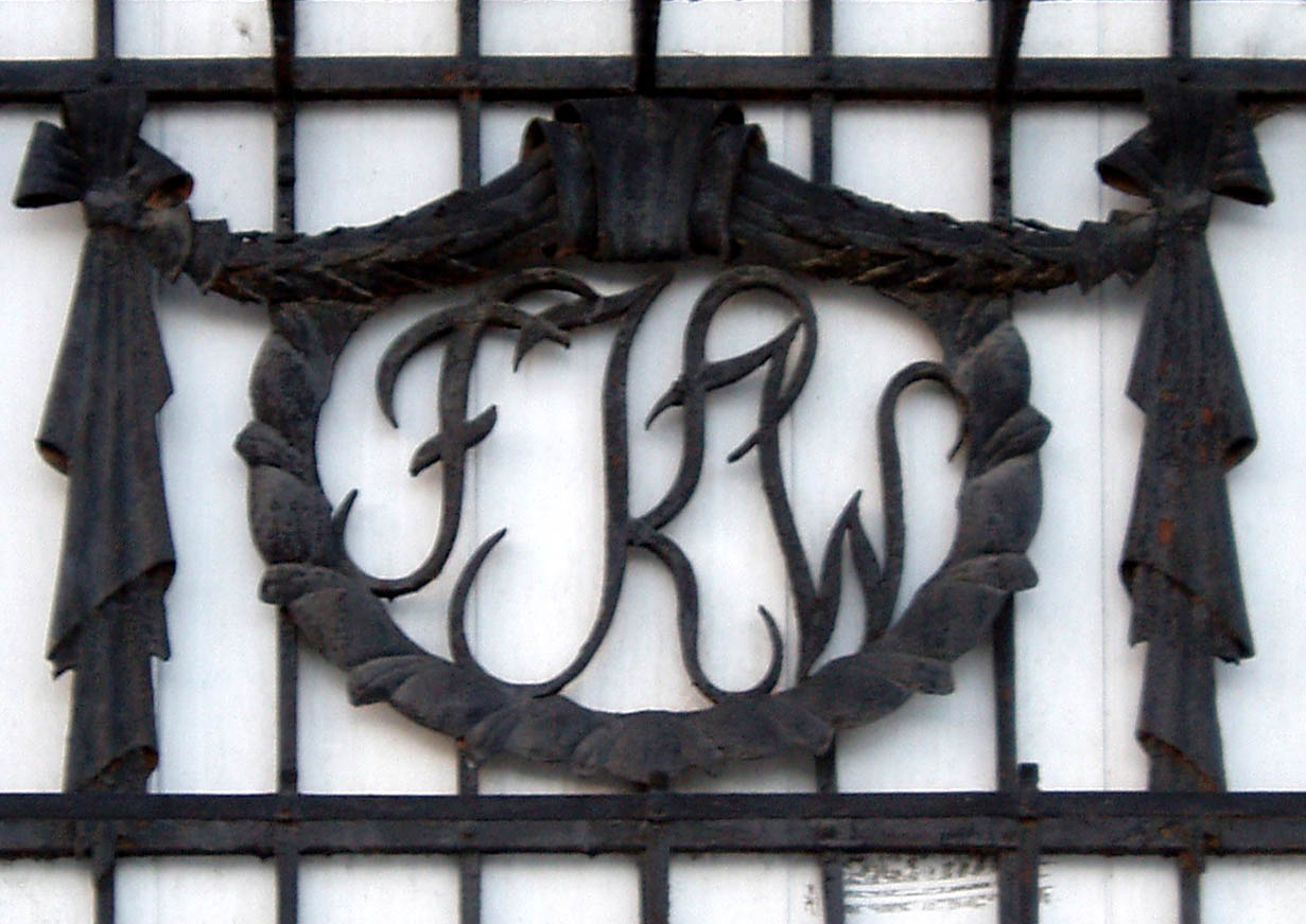 Логотип Фонду військового квартирування (FKW) на будинку № 42 на вулиці Городоцькій у Львові. Збудованому 1930 року за проектом Рудольфа Індруха (1882—1927).